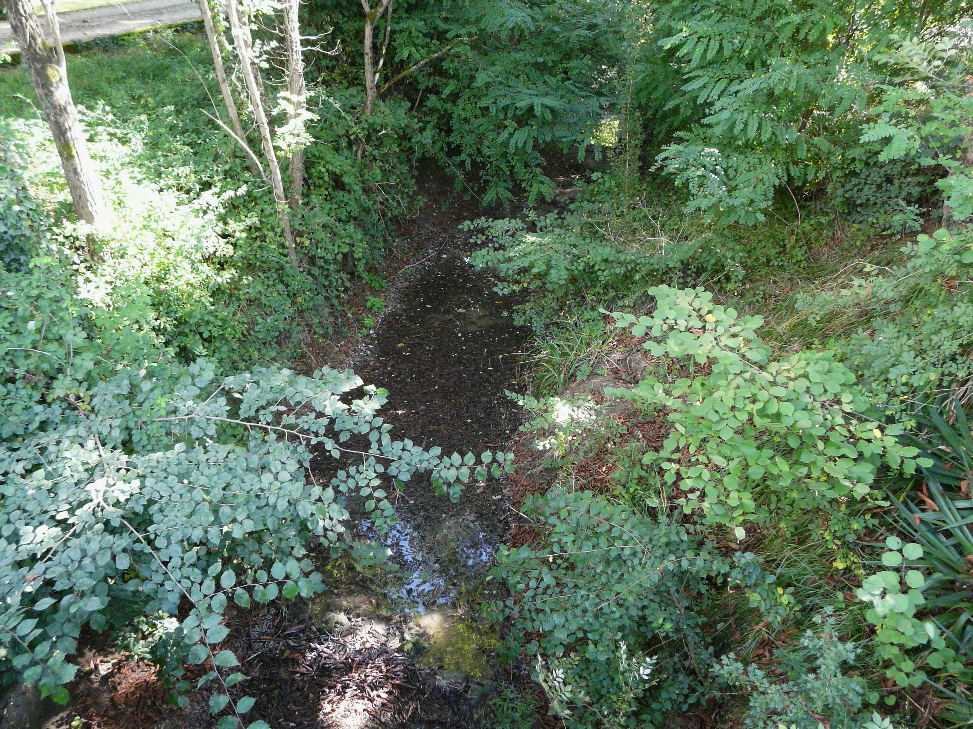 Le lit de l'Estrop presque à sec en aval du pont de la route départementale 936, entre Vélines (à gauche) et Montcaret (à droite), Dordogne, France.